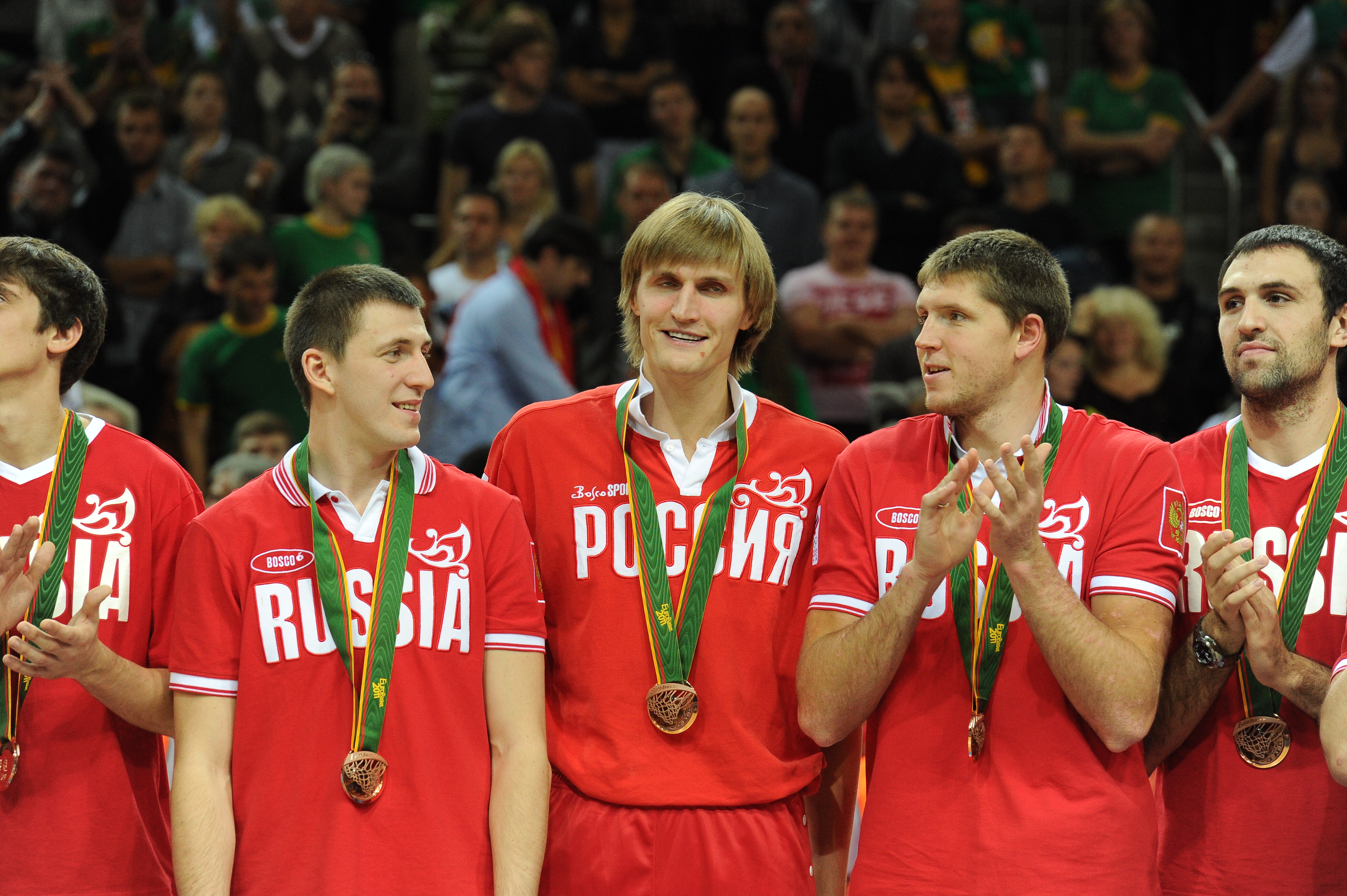 Russia national basketball team at Eurobasket 2011.